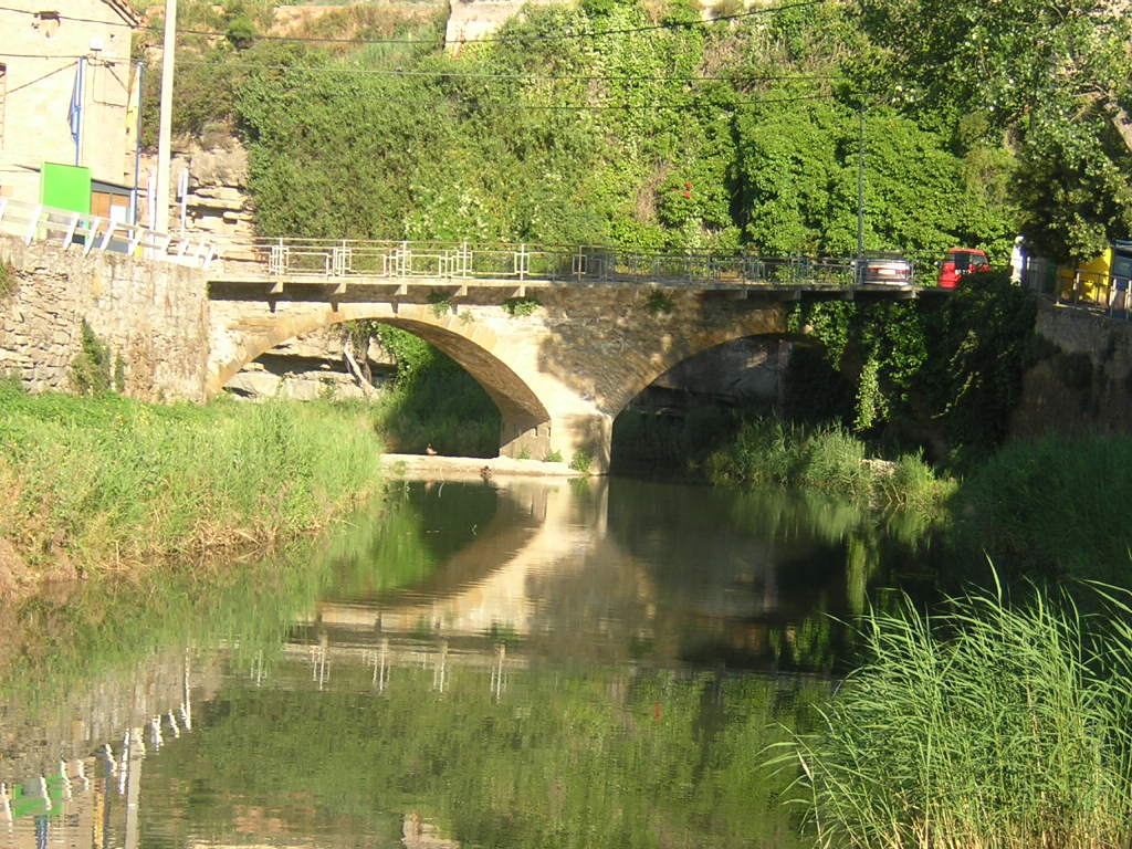 La Riera de Sant Joan i el Pont del Rector (Monistrol de Calders, Moianès)